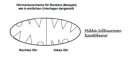 Ohrmarkenschema Rentiere